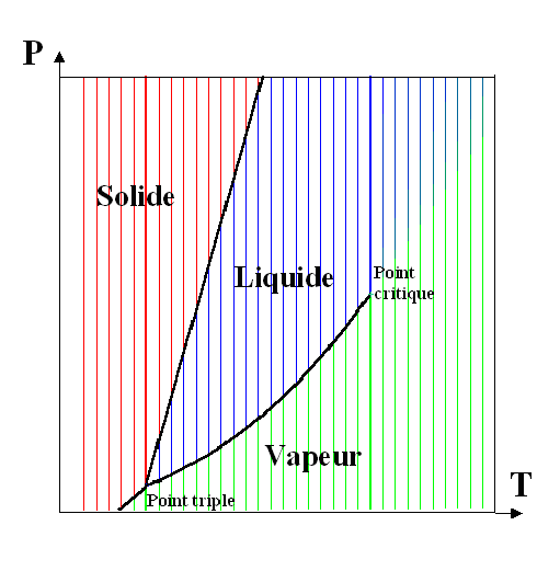 Diagramme P=f(T) des transitions de phases d'un corps pur simple. Catégorie: schéma de physique Auteur: Alain Le Rille